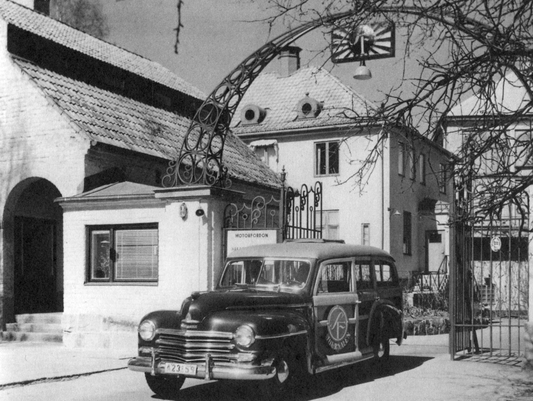 SF:s Journalfilms-bil vid entrén till Råsunda Filmstaden